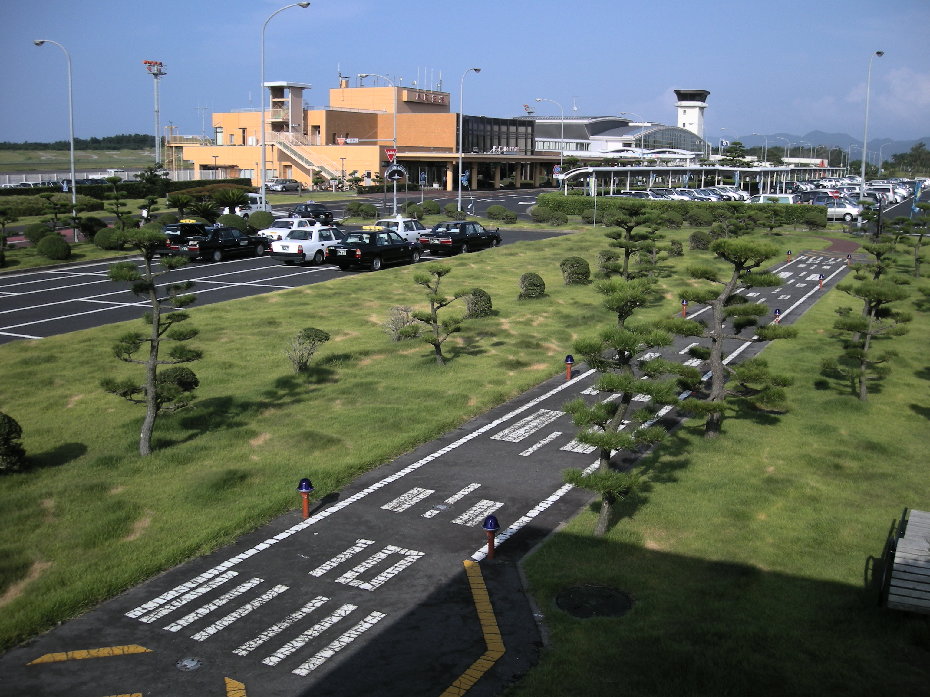 鳥取空港 撮影日 2007年8月23日 撮影場所 空港前広場の展望台 撮影者 投稿者と同じ（Okia） 撮影者によるGFDLリリース